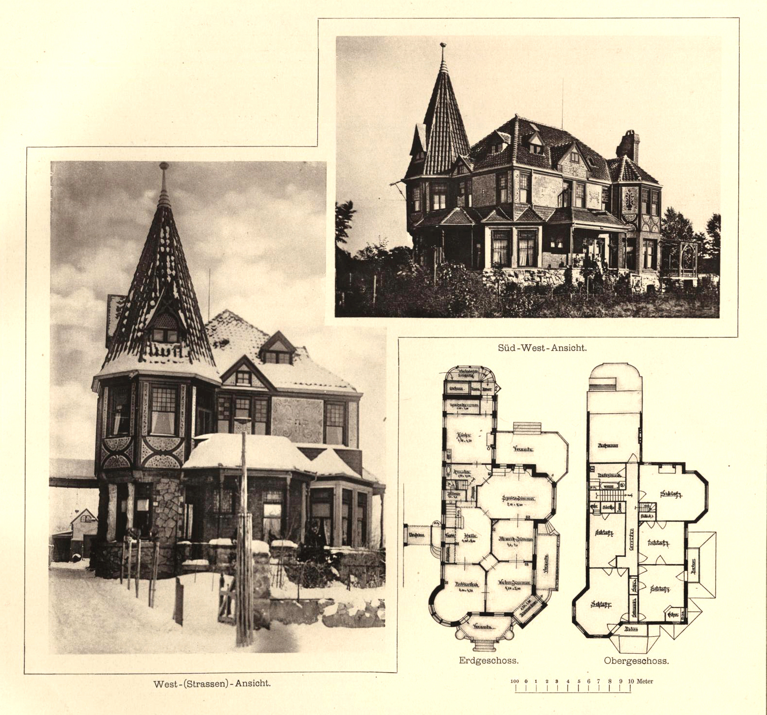 Blattausschnitt aus der Tafel 67 des Bildbandes „Einfache Villen und Landhäuser“ mit zwei im Lichtdruck von Römler & Jonas mit Sitz in Dresden 1902 vervielfältigten Fotografien und zwei Grundrisszeichnungen der 1890 erbauten „Villa Heimchen des Herrn Hauptmann Milinowski in Herrenhausen bei Hannover, Alleestraße“